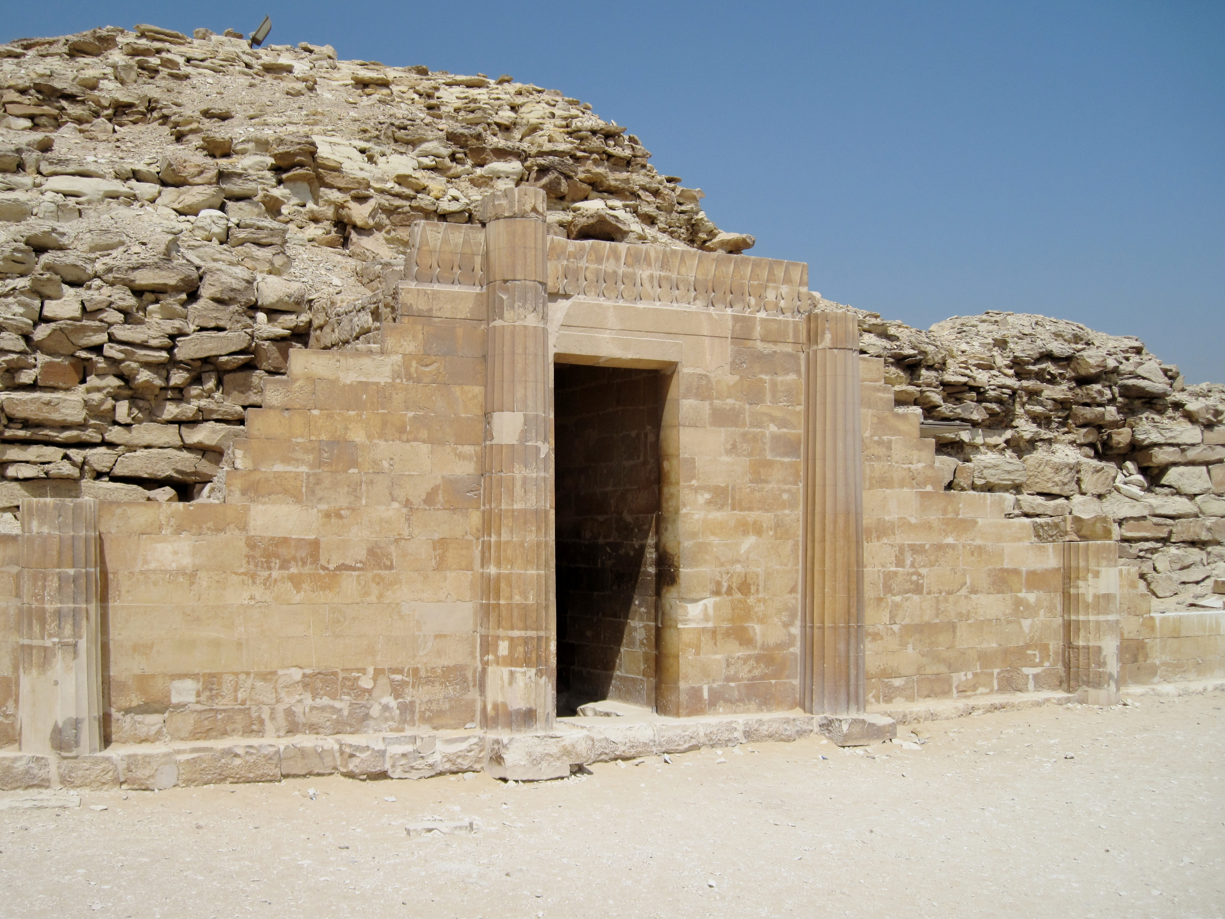 Eingang zum „Südpavillon“, östlich der Stufenpyramide des Pharao Djoser aus der 3. Dynastie des Alten Reiches in Ägypten